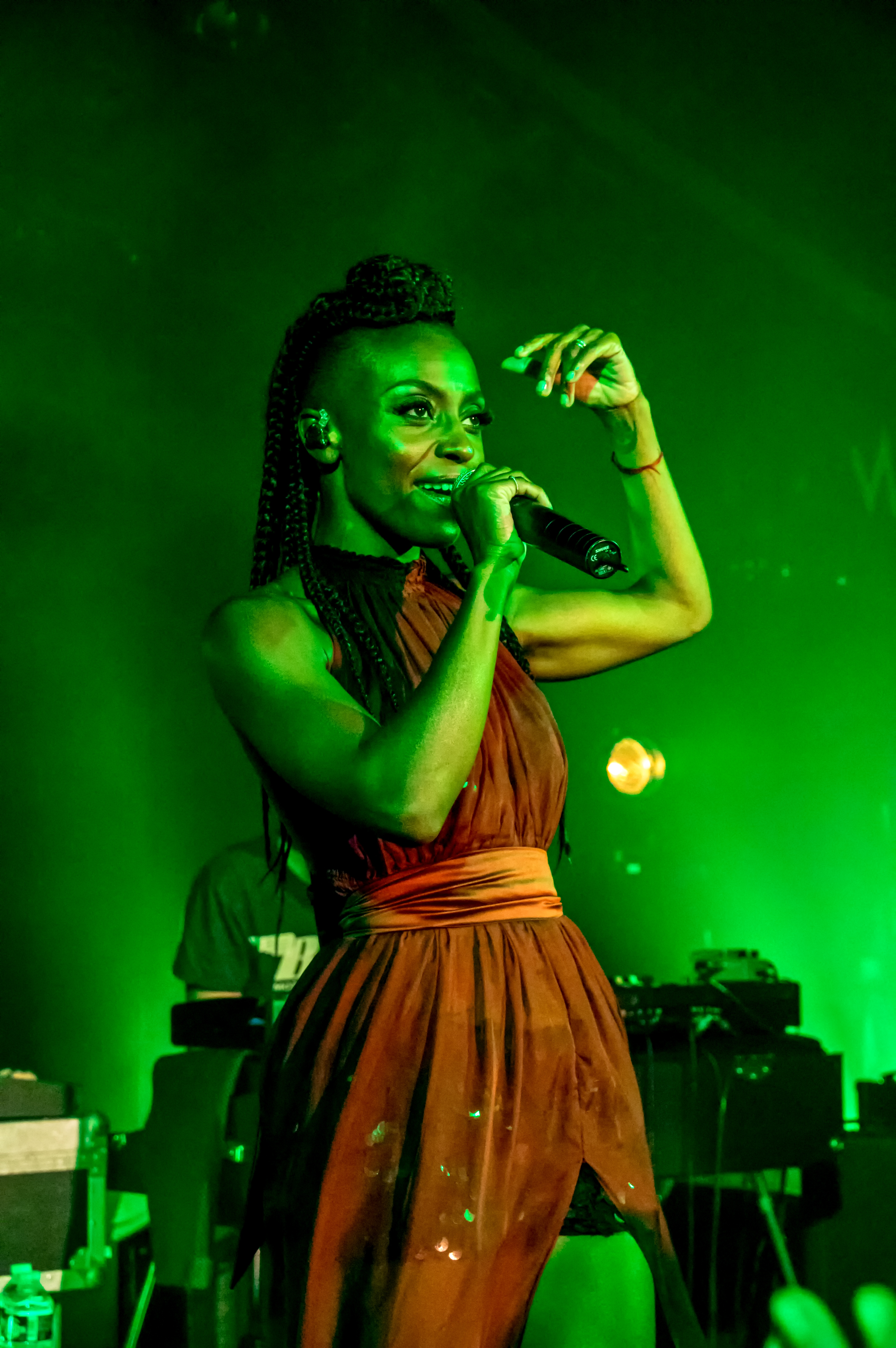 Bilder vom Zelt Musik Festival 2018 in Freiburg im Breisgau Morcheeba Auftritt am 31. Juli 2018 im Speigelzelt